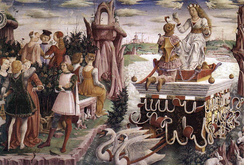 detail